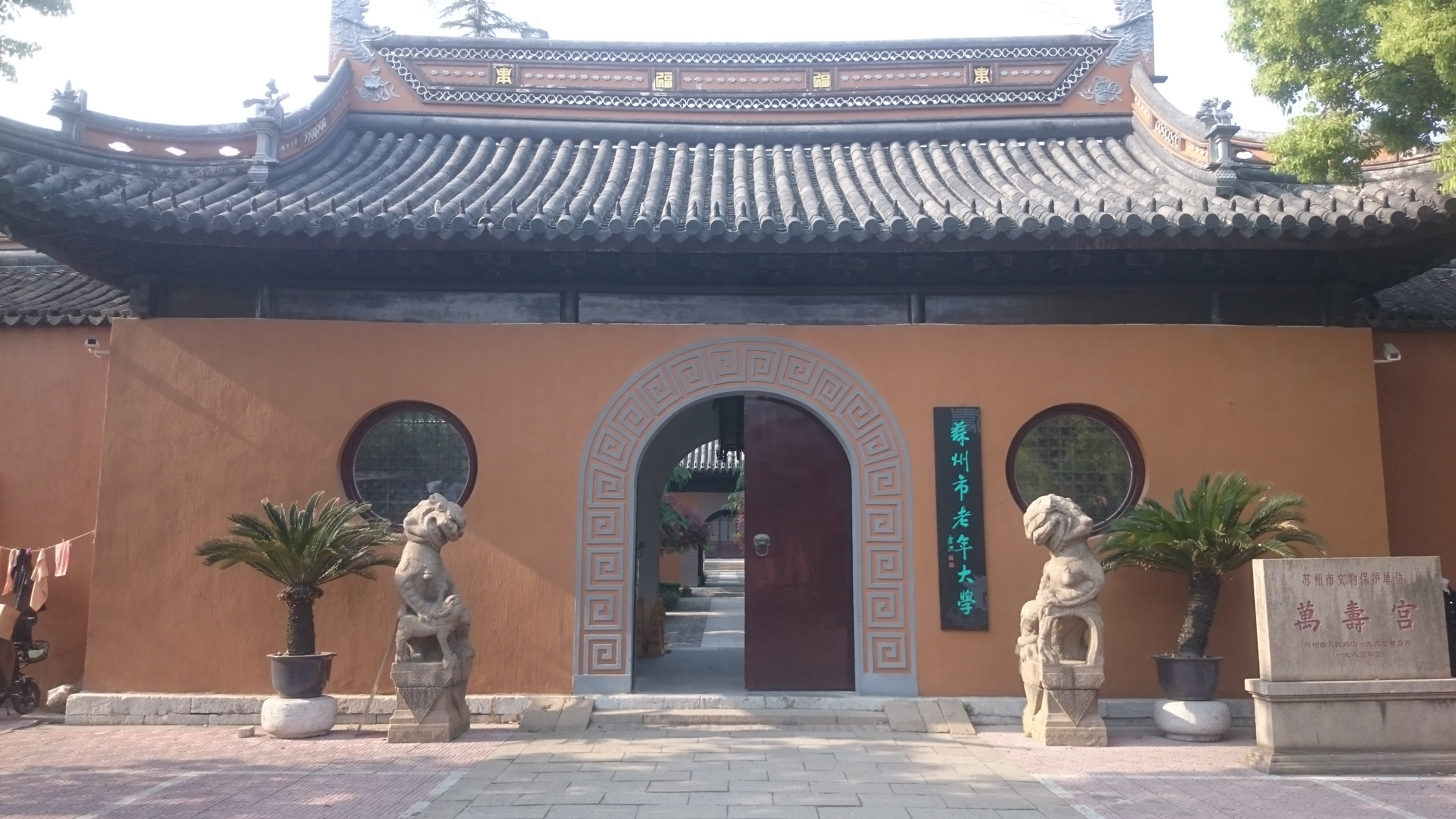 中文（中国大陆）: 苏州万寿宫 宫门 正门